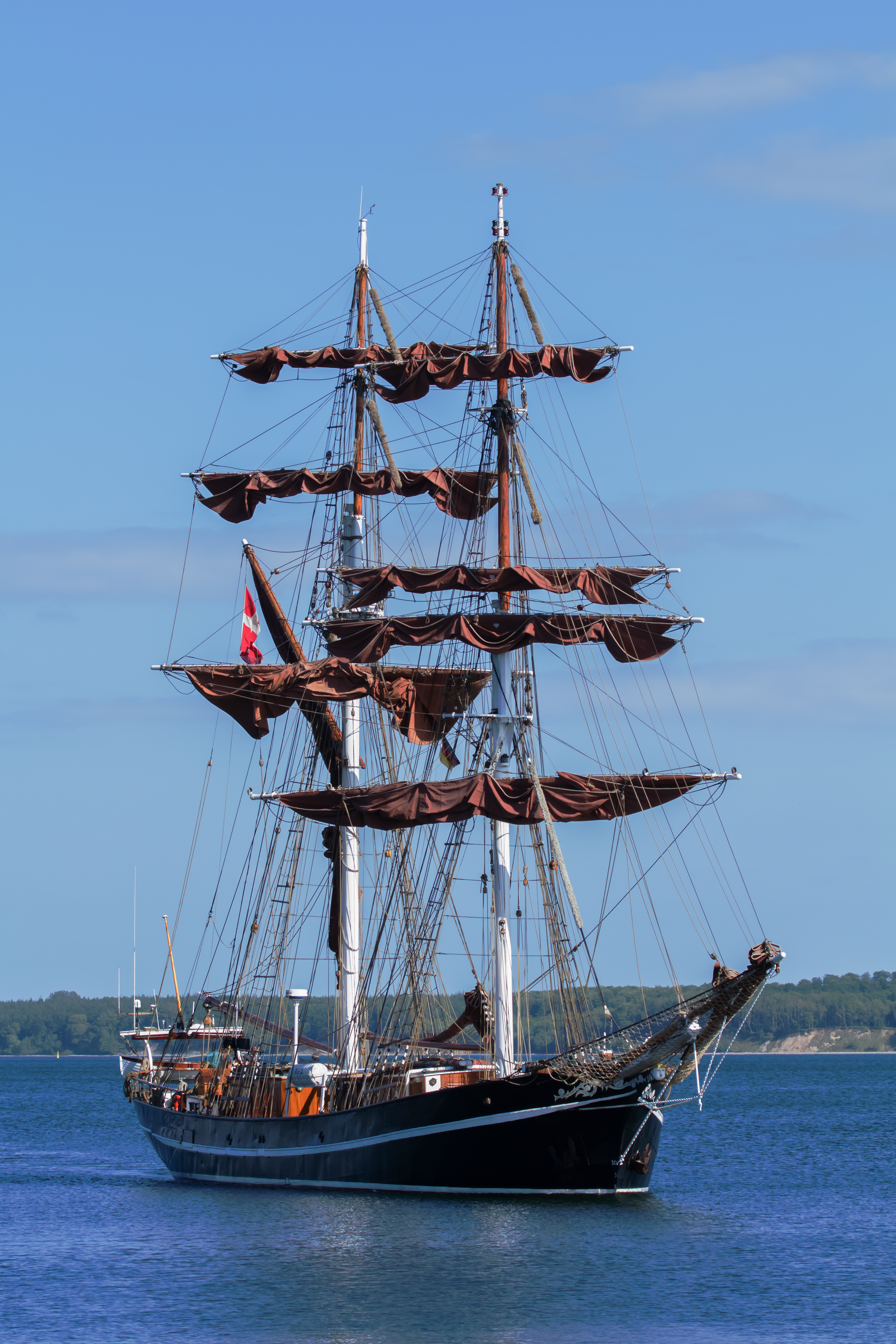 Die Eye of the Wind ist ein zweimastiges Segelschiff, das 1911 als Toppsegelschoner vom Stapel lief und seitdem mehrere Änderungen der Takelung erfuhr.